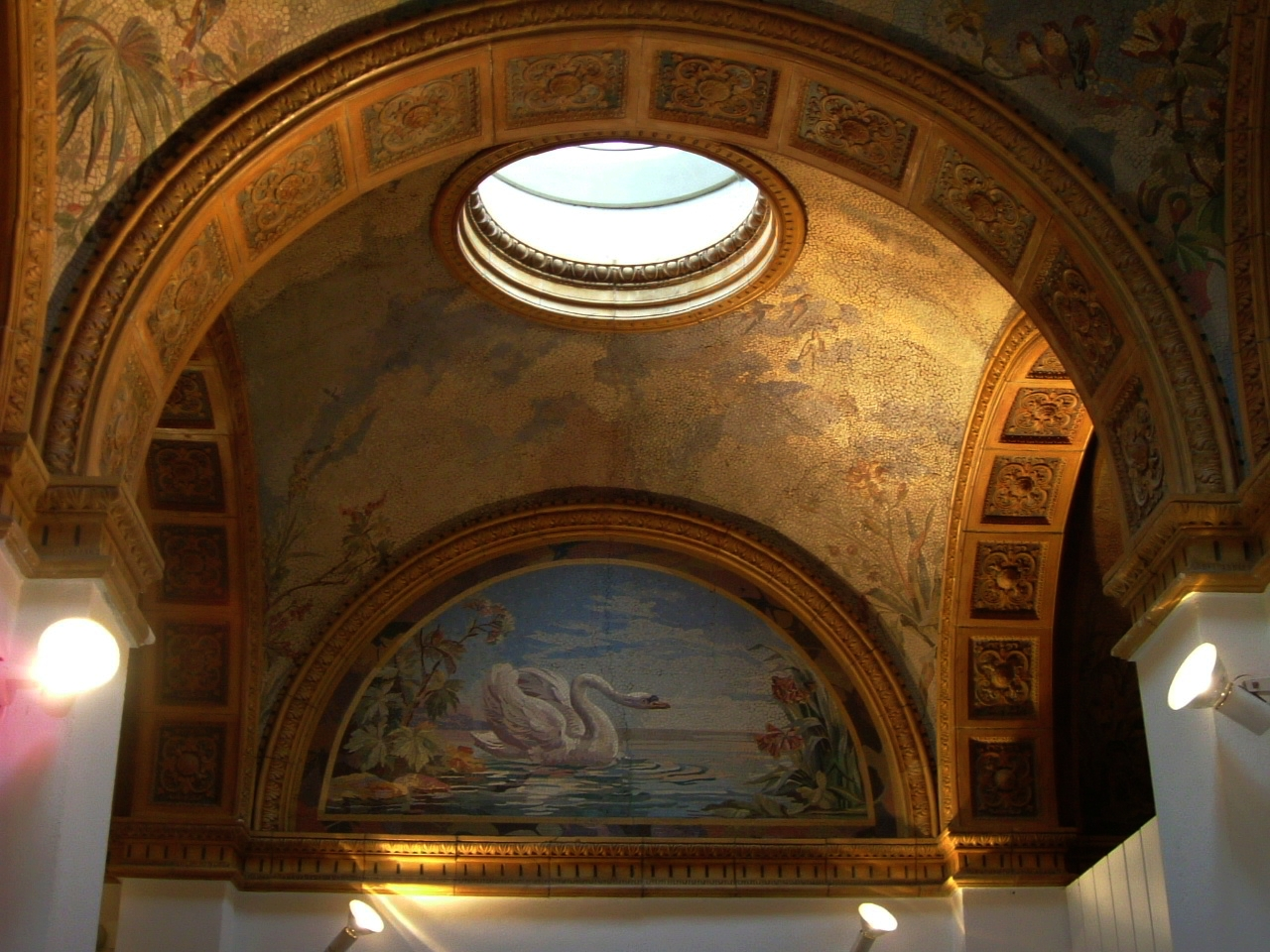 Die Mosaikkuppel des translozierten Fürstenbades aus dem Kaiserbad in Aachen (heutiger Standort in den "Kurparkterrassen" im Burtscheider Kurpark)